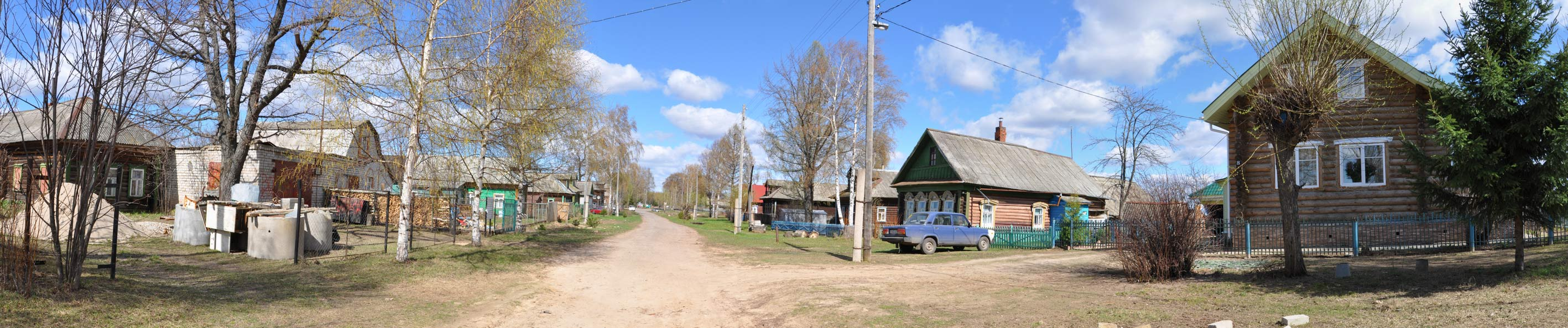 Липовицы панорама 2012